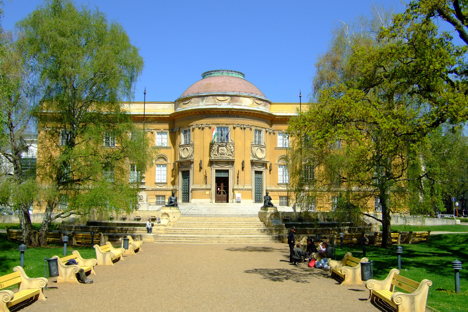 Déri Múzeum (Debrecen, Déri tér) This is a photo of a monument in Hungary. Identifier: 5226